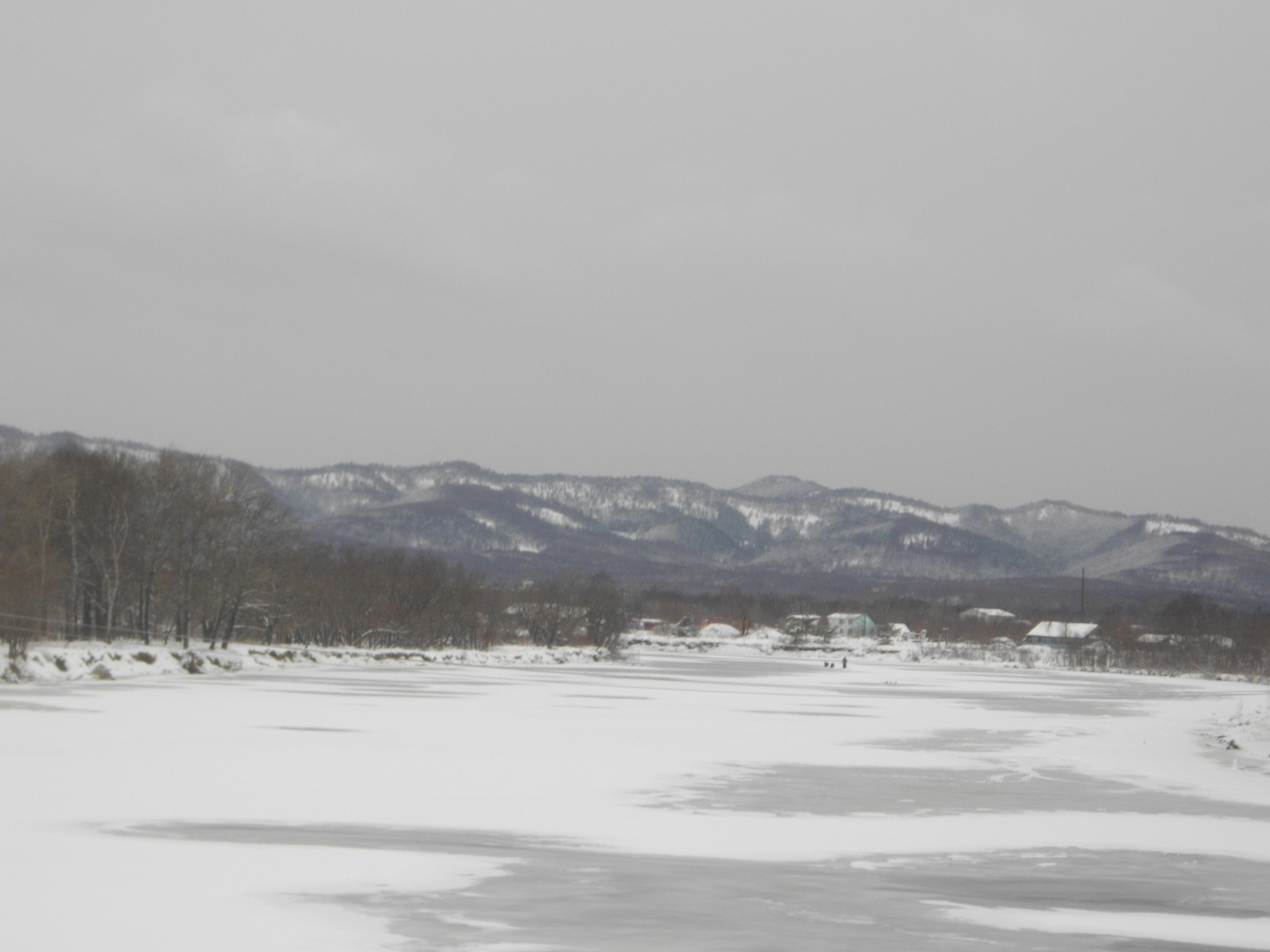 Река Лютога зимой, вид с моста в Аниве Unknown